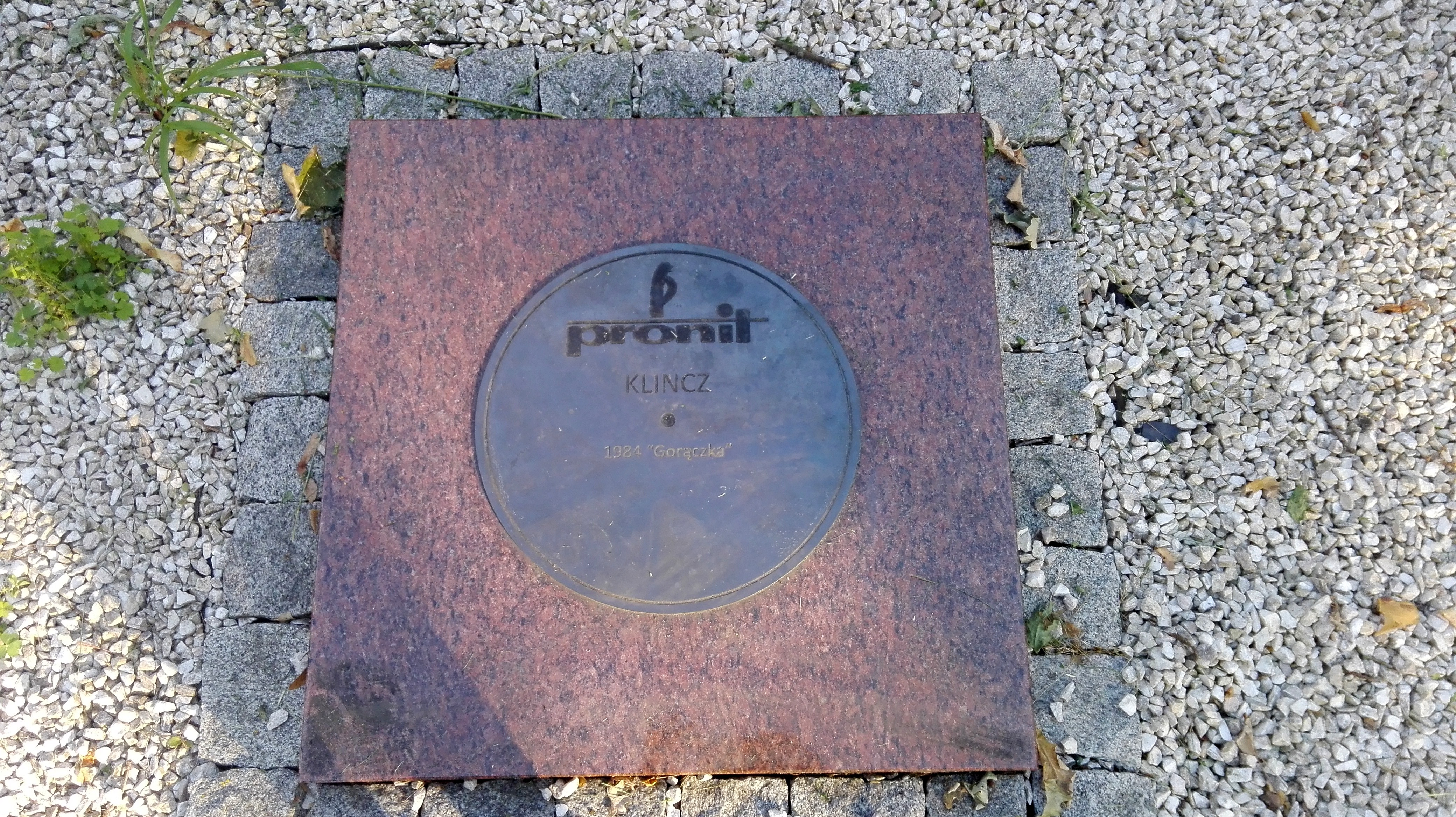 Pionki, w Centrum Aktywności Lokalnej została utworzona Izba Regionalna „Czarnej Płyty”, Klincz.